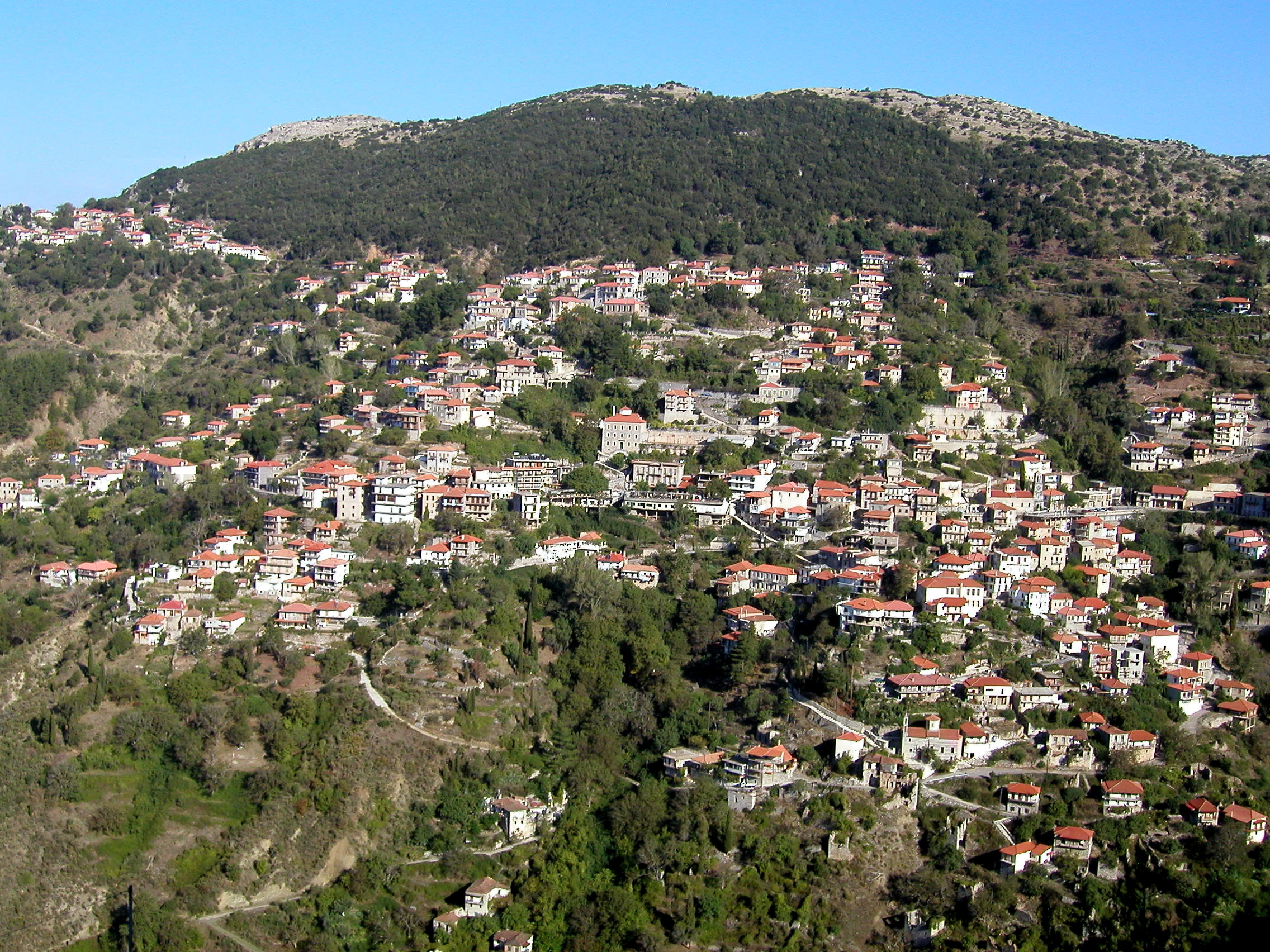 Langadia